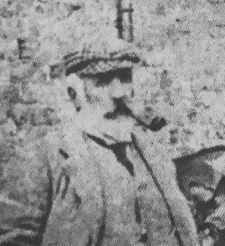 വില്യം ലോഗൻ. മാതൃഭൂമിയിൽ നിന്ന്. ചിത്രം 1914-നു മുൻപുള്ളതാണ് (ചിത്രത്തിലെ വ്യക്തി 1914-ൽ മരണമടഞ്ഞു)